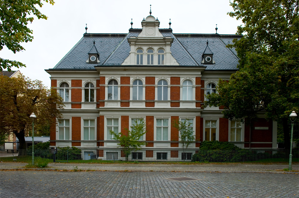 Villa Oppenheim in Berlin-Charlottenburg, Schloßstraße 55, 14059 Berlin